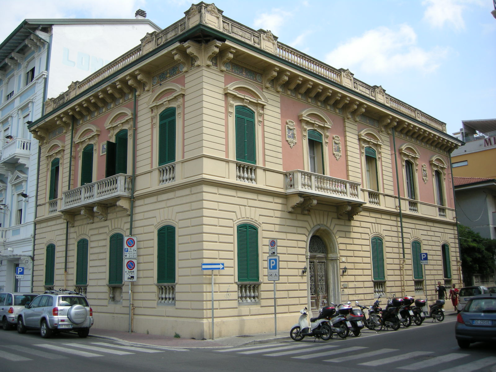 Villino Brunetti